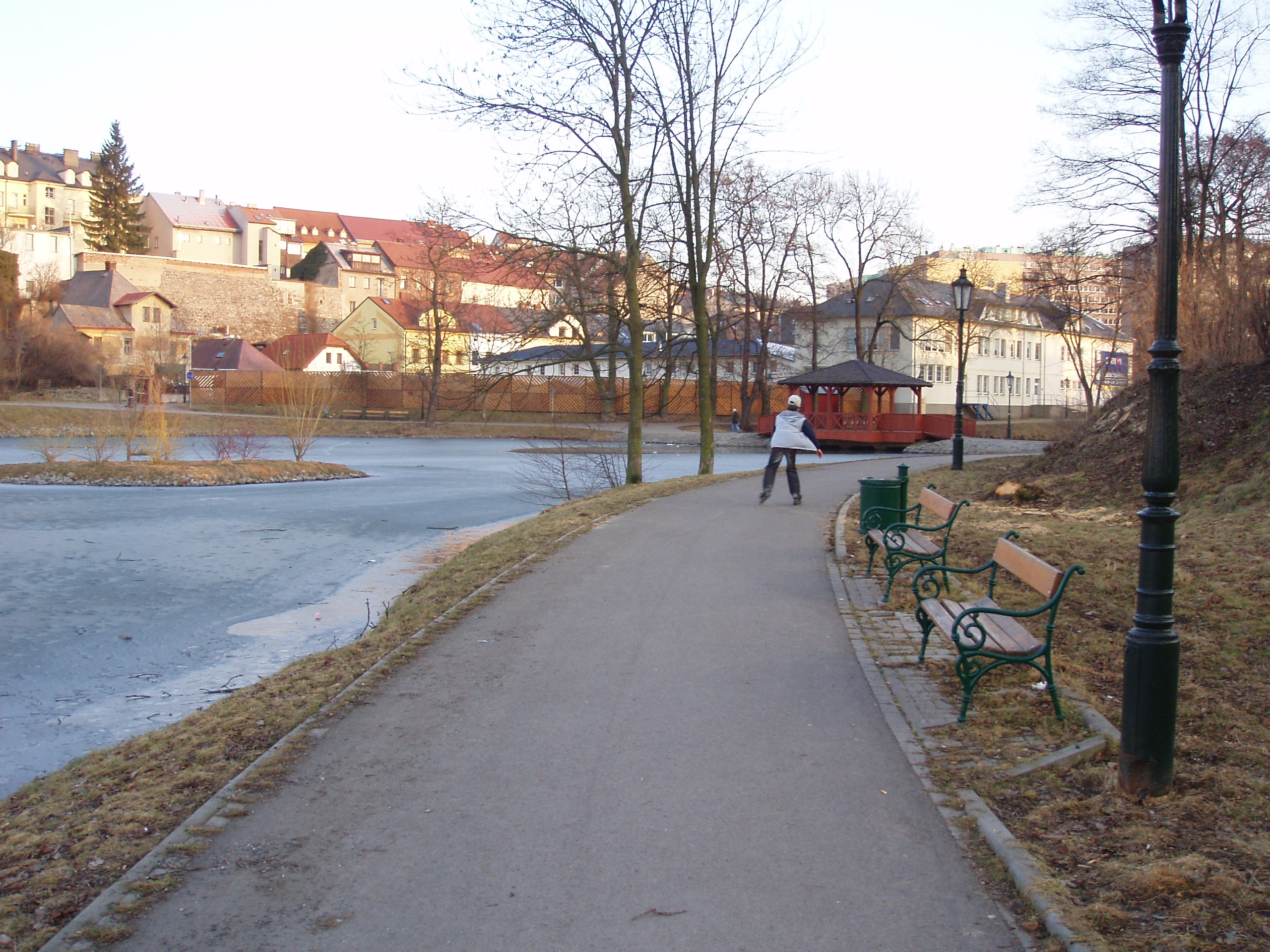 Příbram - rybník Hořejší Obora